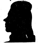 Nils Lorens Sjöberg (1754–1822), ämbetsman och poet, ledamot av Svenska Akademien.